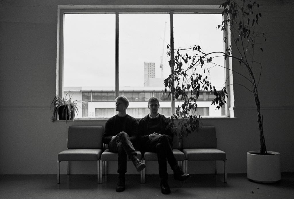 Omaloma band